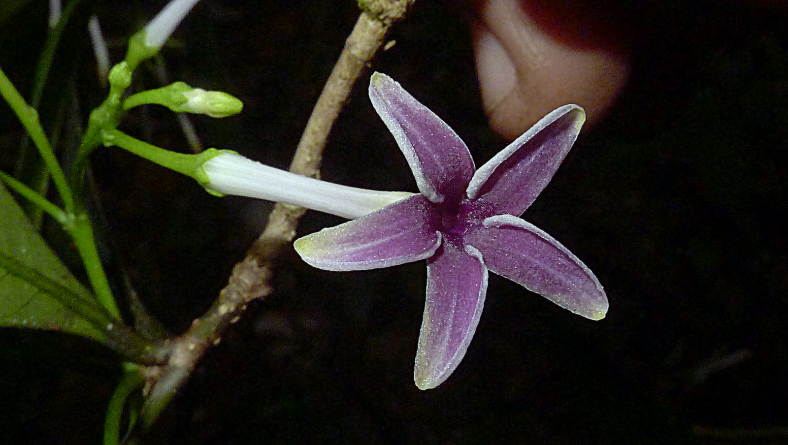 Rauvolfia grandiflora Mart.